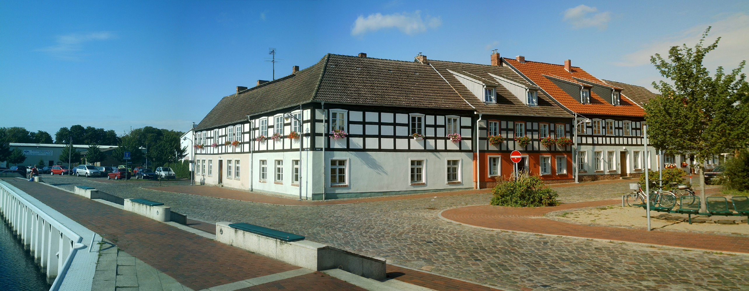 Der Ackerhof war der Versorgungshof für das Schloss in Ueckermünde